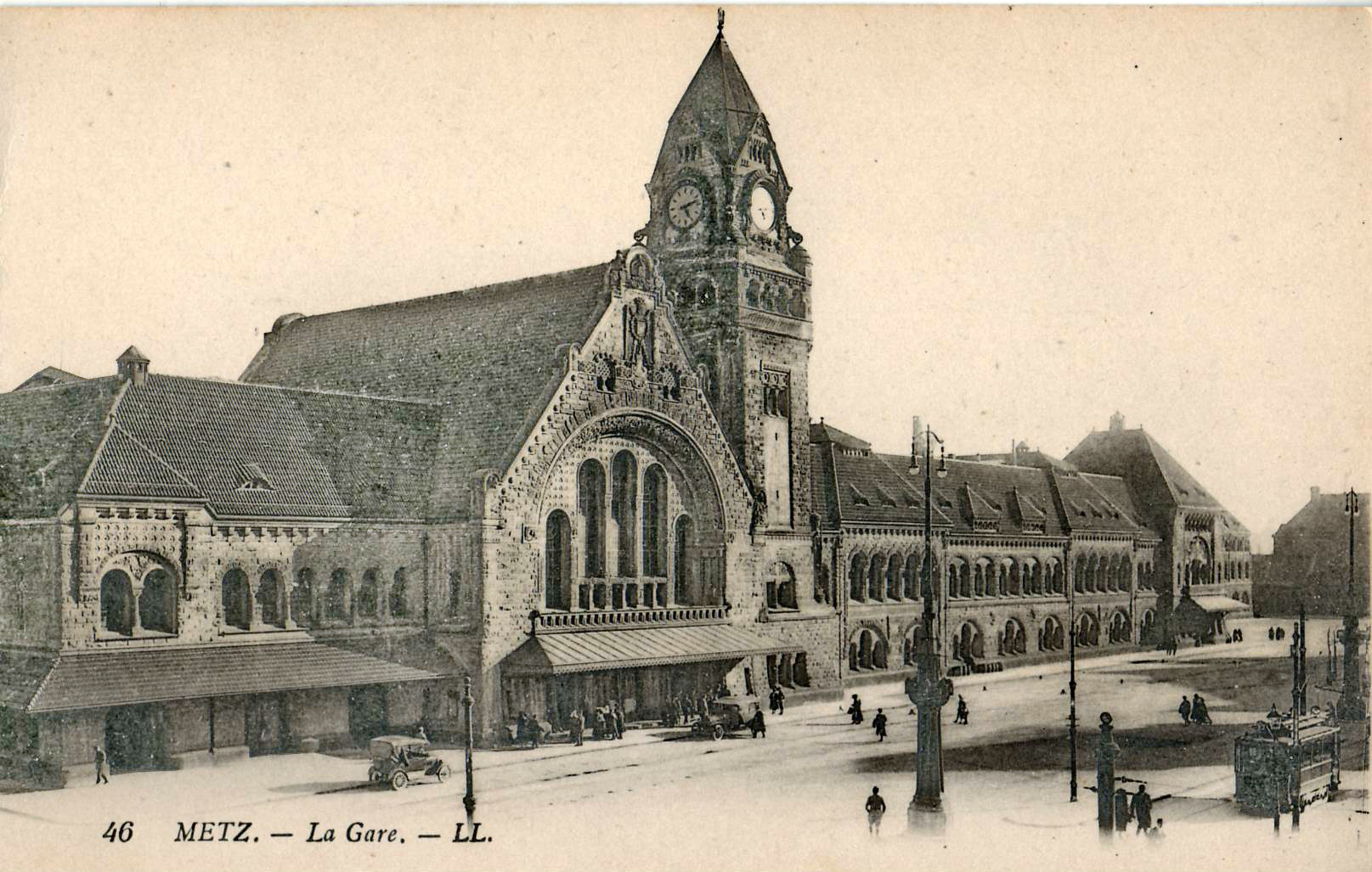 Carte postale ancienne éditée par LL, n°46 : METZ - La Gare